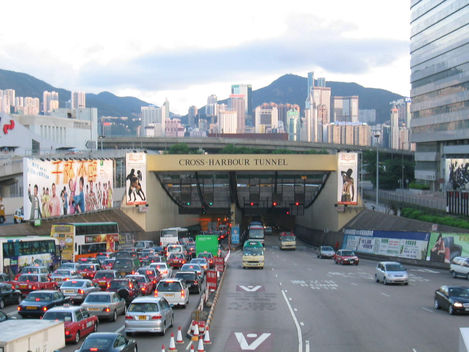 Habour Tunnel, Tsim Sha Tsui, Hong Kong